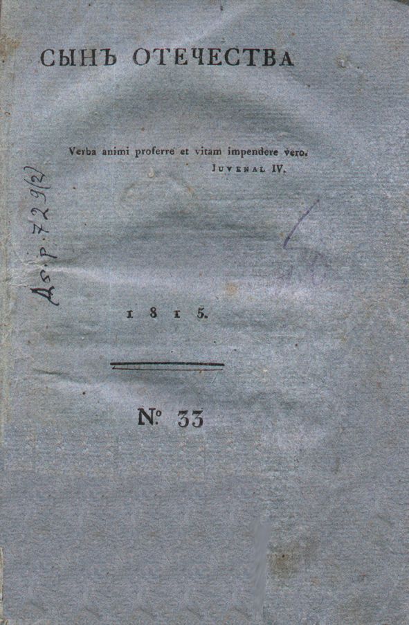 "Сын отечества", обложка журнала